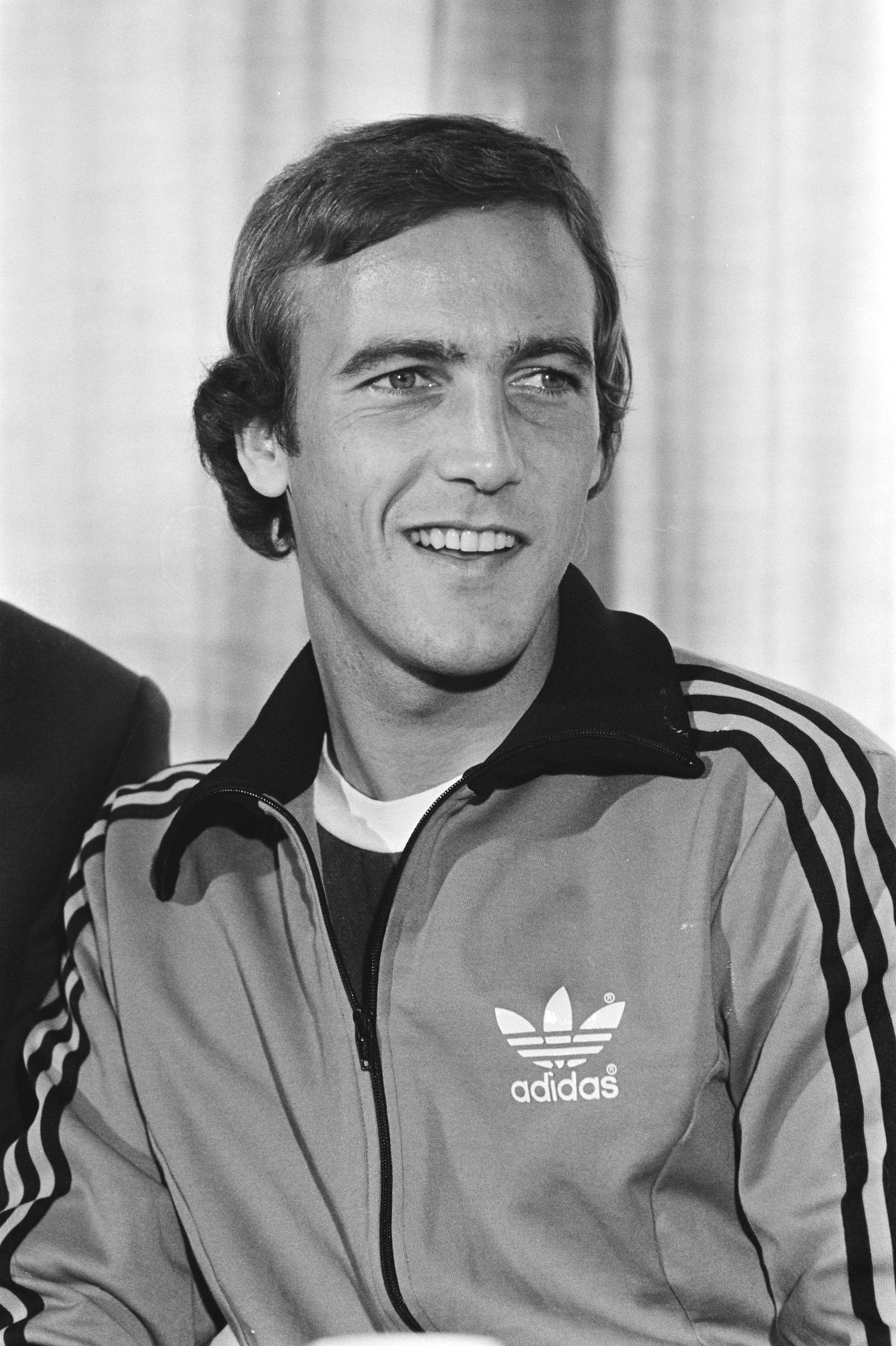 Johan Neeskens tijdens de persconferentie.